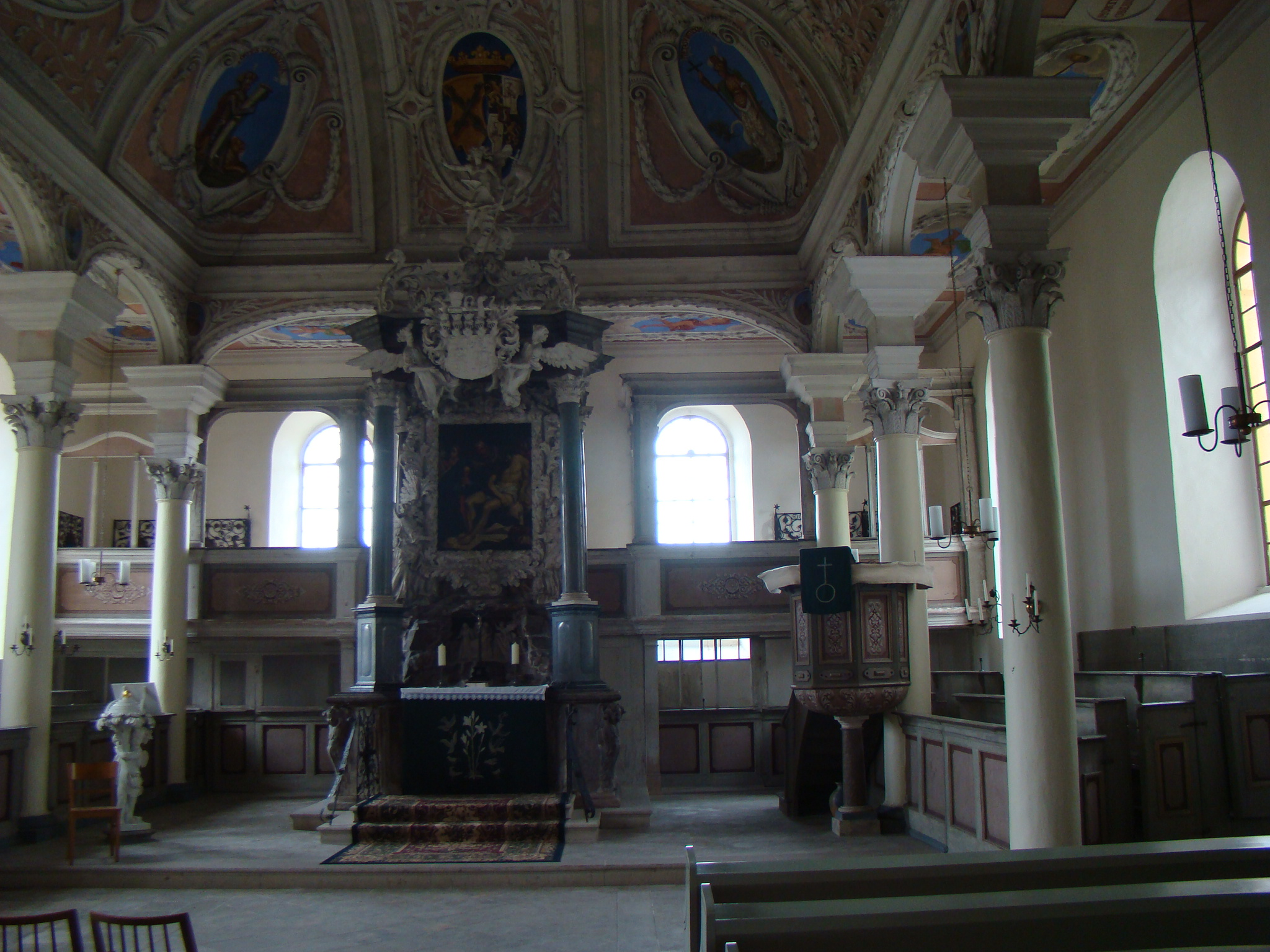 Stadtkirche Oppurg